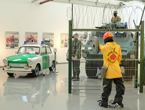 Ausstellungshalle der Polizeigeschichtlichen Sammlung Niedersachsen in Hannover